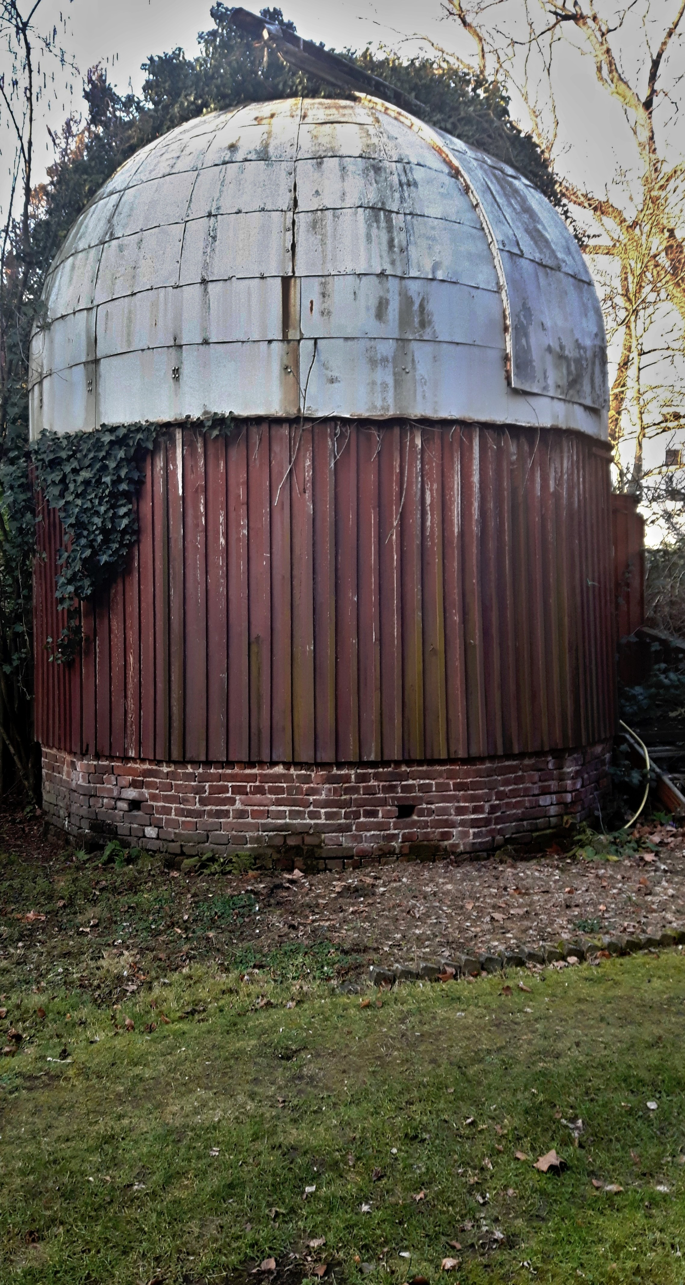 Hilden Heiligenstraße Gartensternwarte Röttger